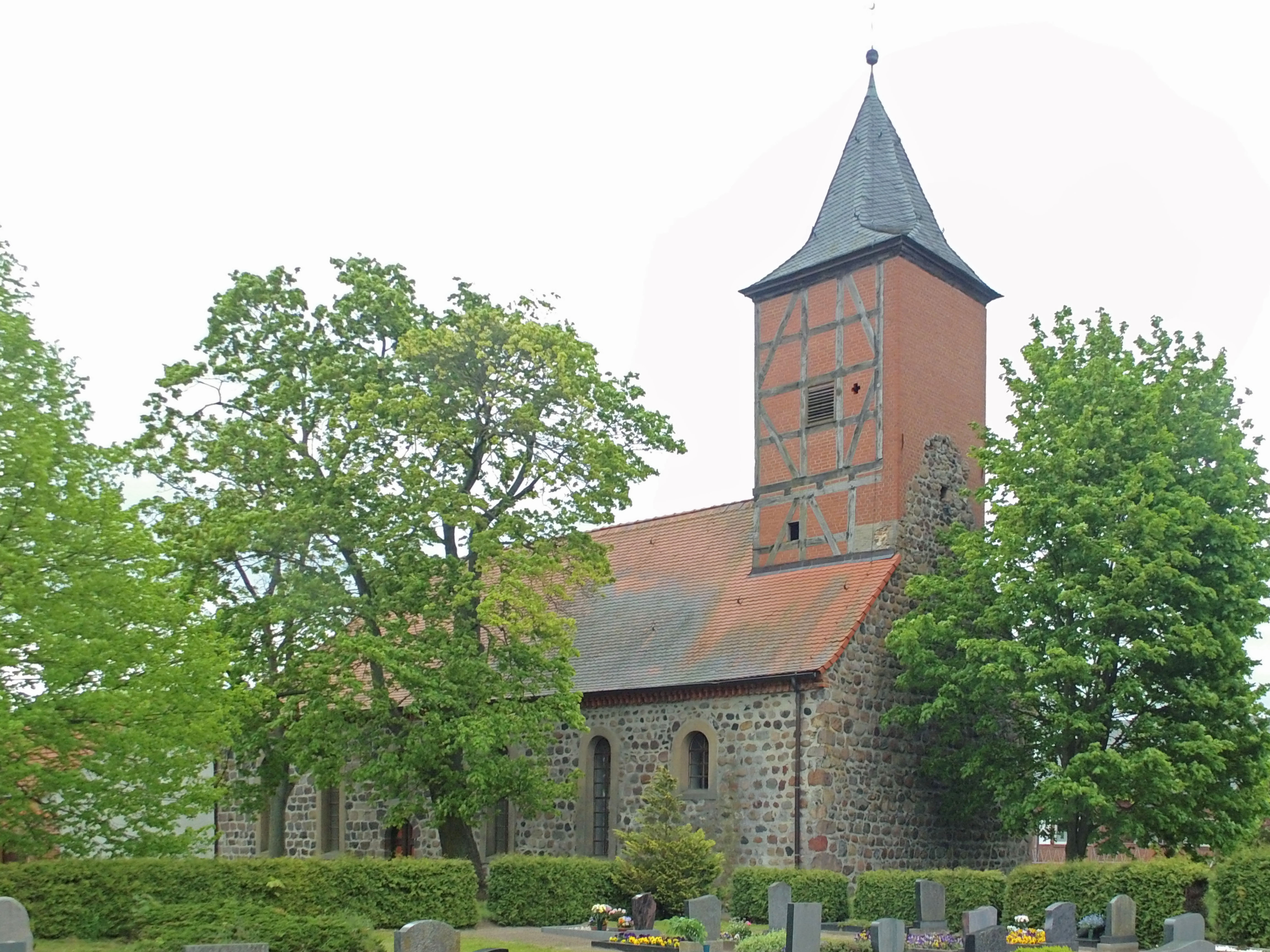 Evangelische Kirche in Lindstedt bei Gardelegen.